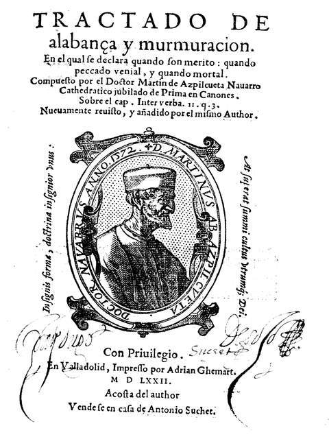 Azpilcueta, Tratado de alabanza, Valladolid, Ghemart, 1572